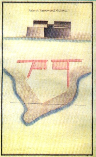 "Forte do Terreiro de São Matheuz", s/d, autor desconhecido, Arquivo Histórico Militar, Lisboa. in MARTINS, José Salgado, "Património Edificado da Ilha Terceira: o Passado e o Presente". Separata da "Atlântida", vol. LII, 2007. p. 16. Também integrante da "Colecção de Plantas e Alçados de 32 Fortalezas dos Açores, por Joze Rodrigo d'Almeida em 1830", José Rodrigo de Almeida, 1830 (c.) GEAEM (346-1-8A-96), Lisboa, Portugal.